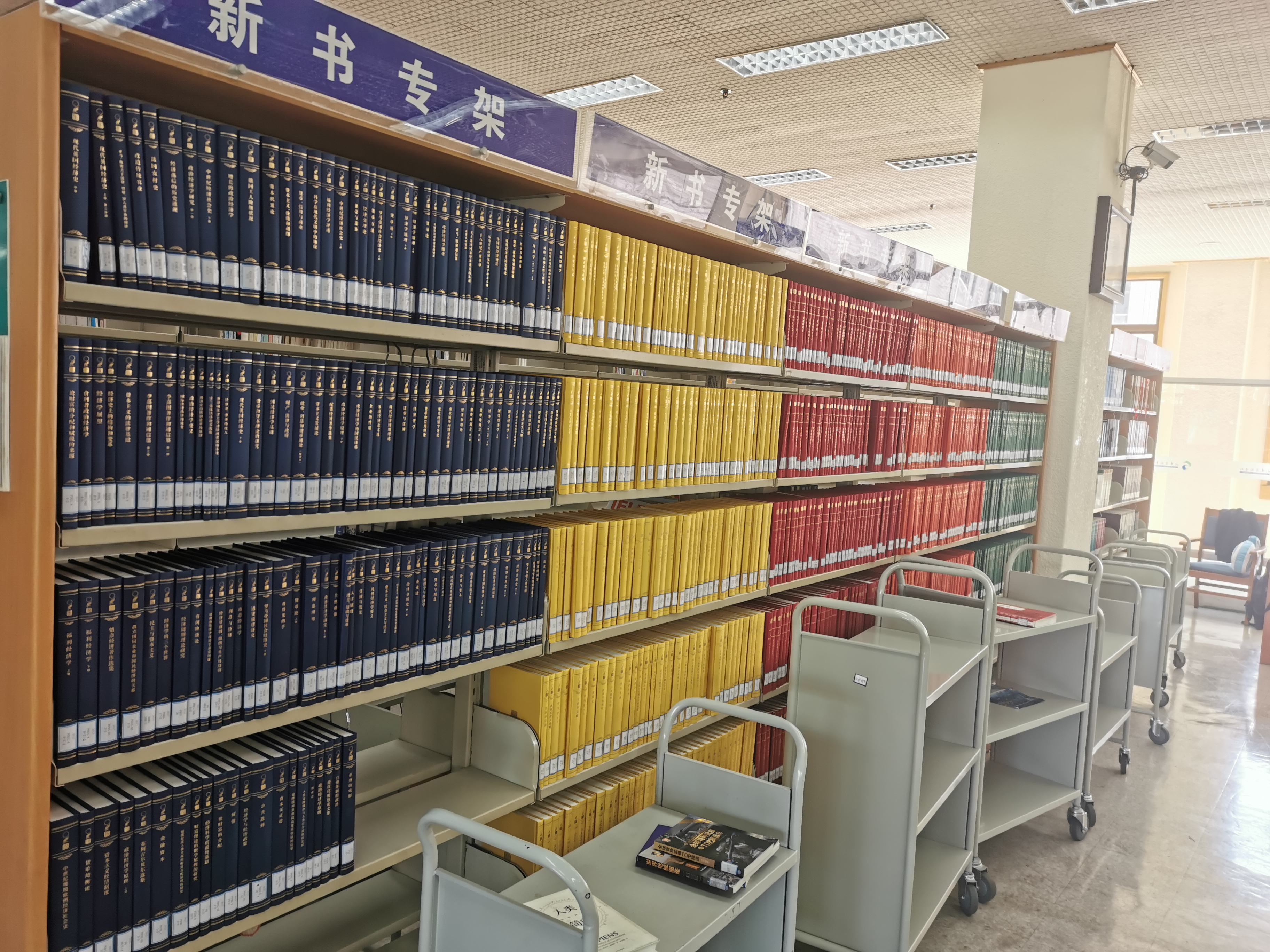 汉译世界学术名著丛书，摄于山东省图书馆三楼